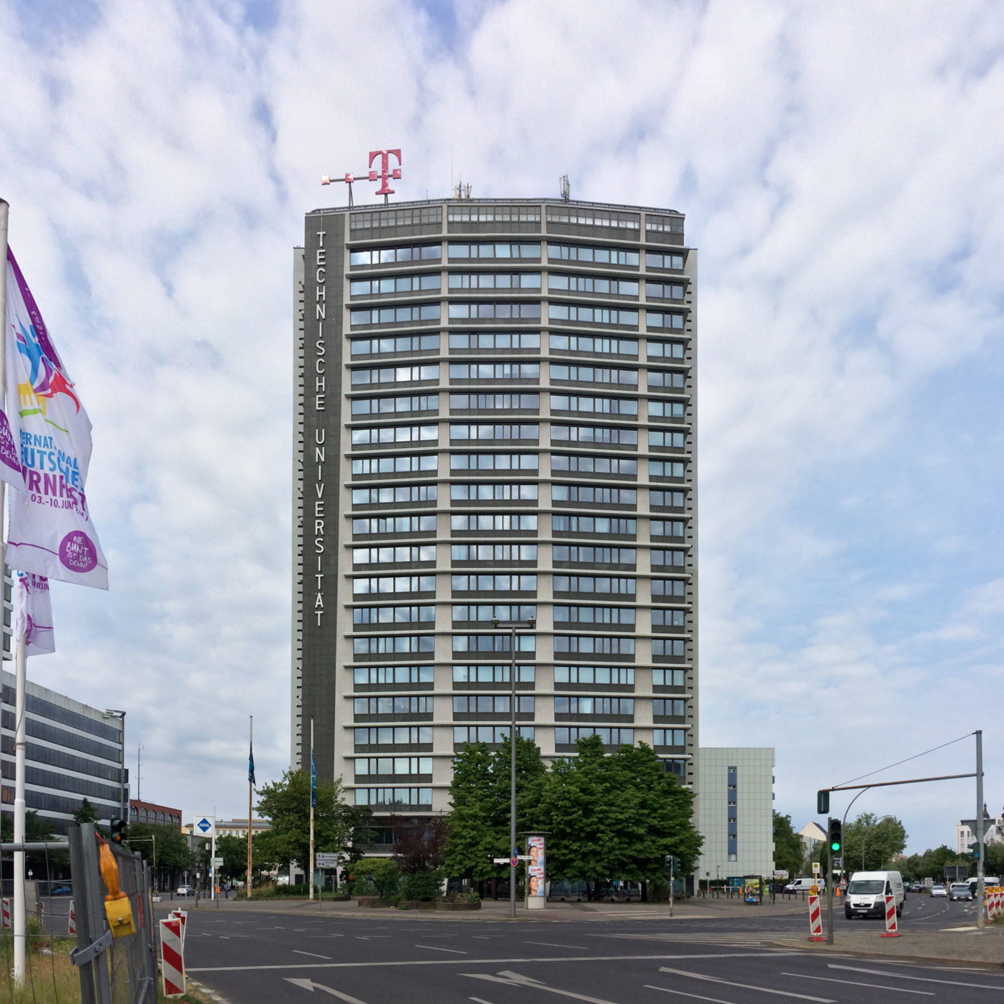 Telefunken-Hochhaus, ehemaliges „Haus der Elektrizität“, heute Technische Universität, Ernst-Reuter-Platz, Berlin-Charlottenburg, 1958–1960, Paul Schwebes und Hans Schoszberger